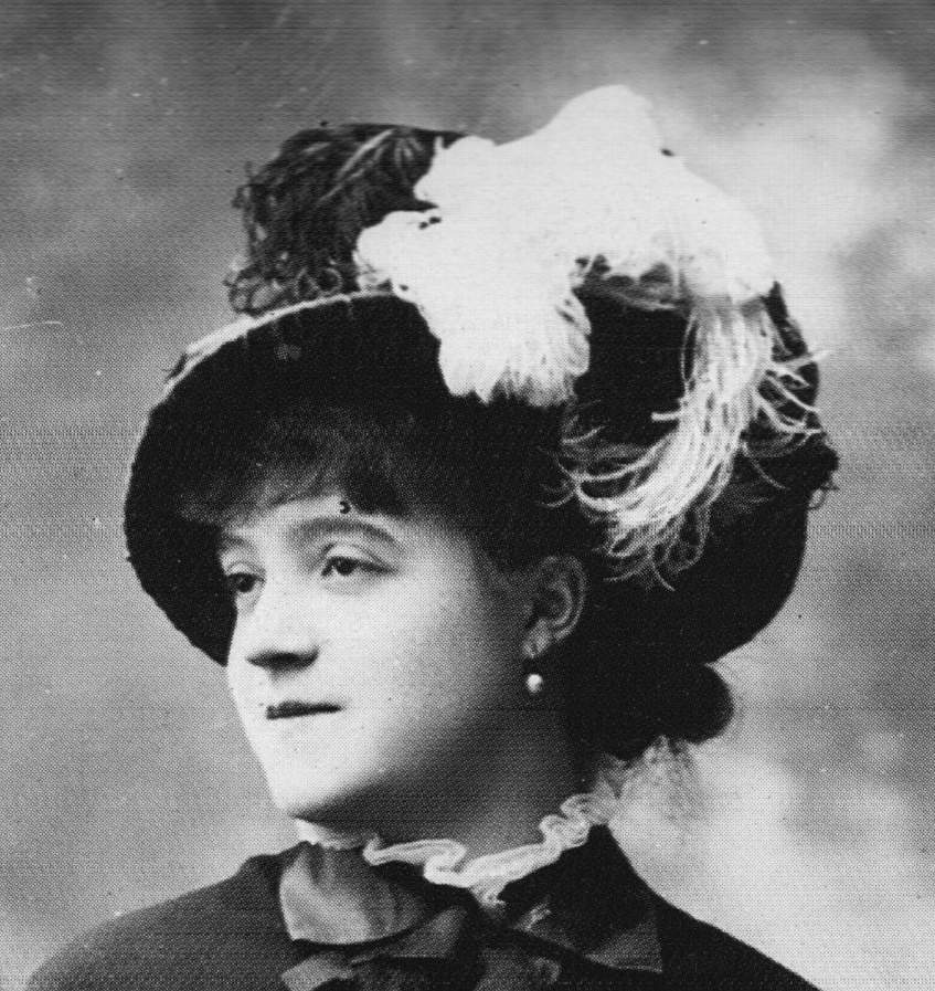 Ellen Andrée - french actress (detail)